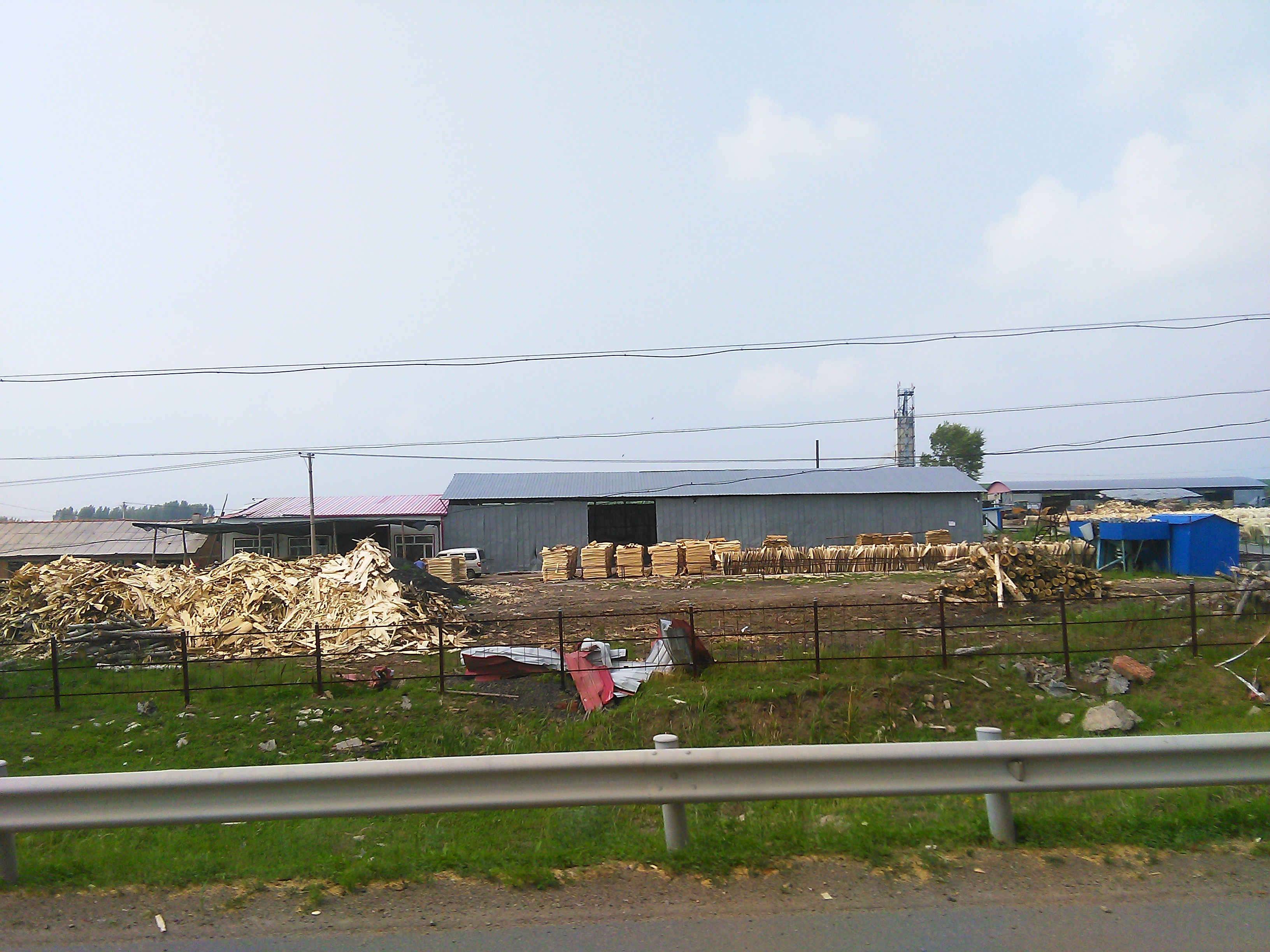 中文（中国大陆）: 望奎县灯塔乡